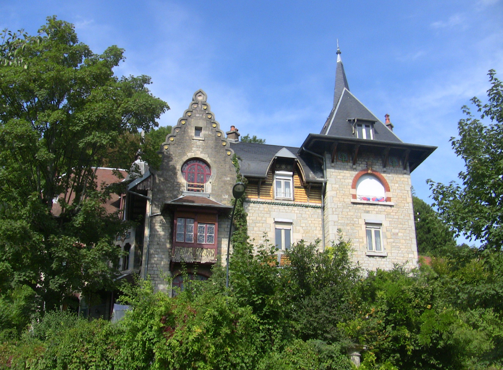 La villa des Fontenottes de Bregille, à Besançon (Doubs, France).